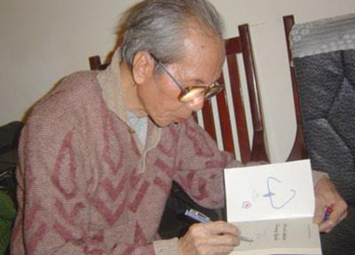 Tại nhà